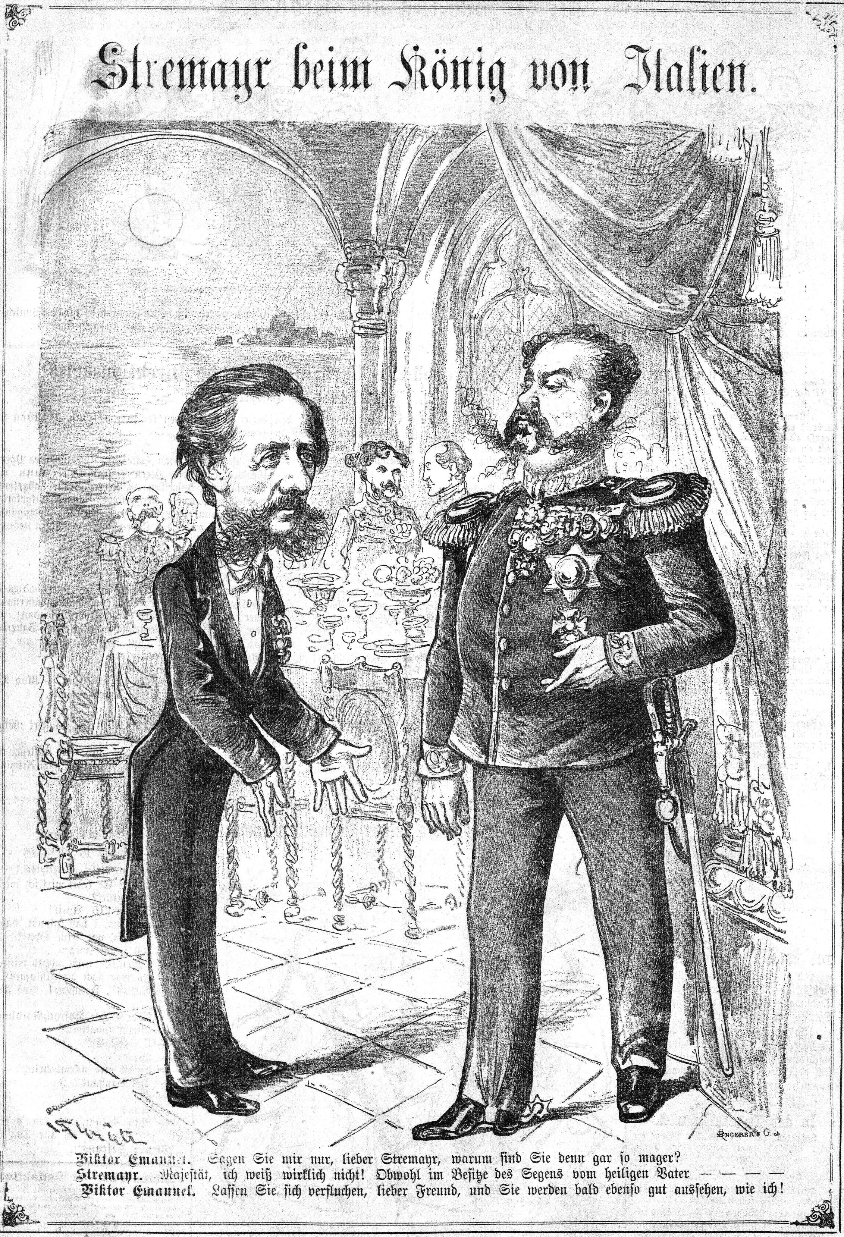 Carl von Stremayr (1875), Karikatur mit ital. König